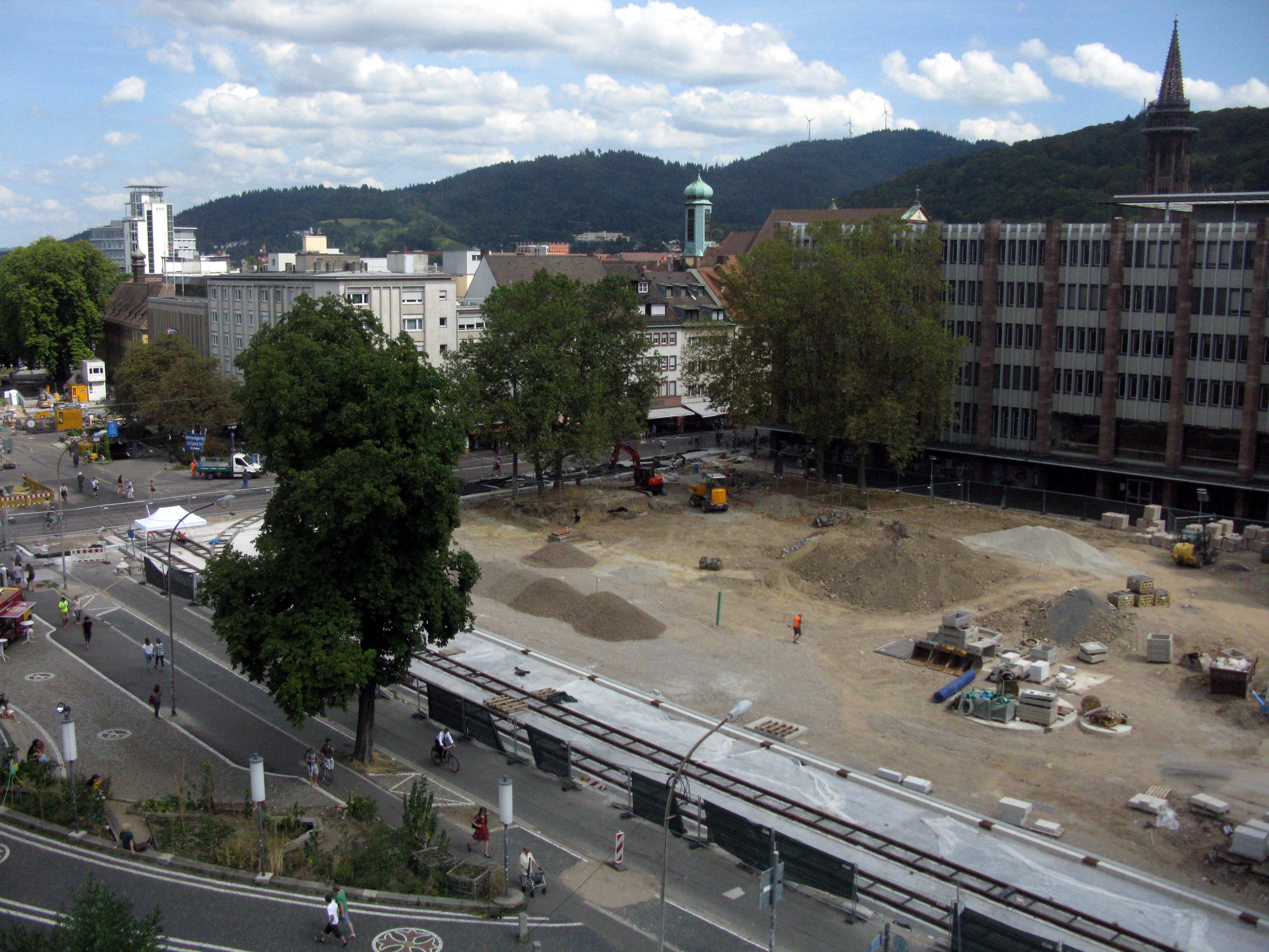 Platz der Alten Synagoge in Freiburg von der UB gesehen, mit neuen Stadtbahngleisen und einer unterirdischen Brunnenstube (rechts unten)